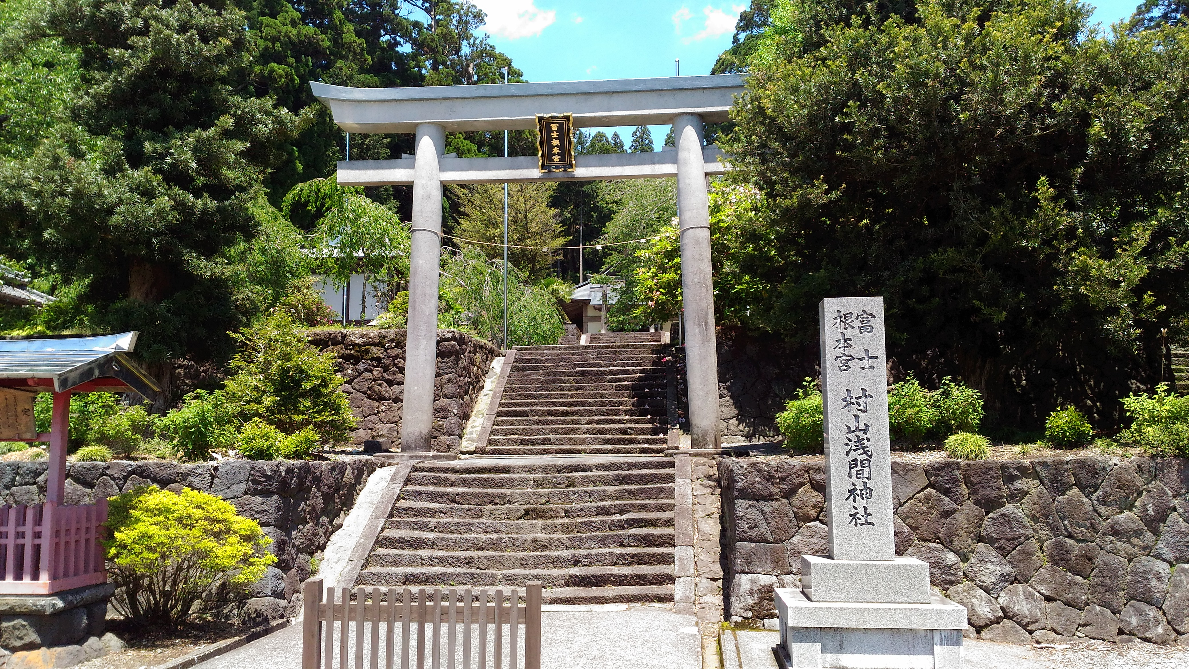 村山浅間神社の鳥居